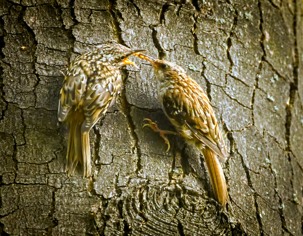 Two short-toed treecreepers (Certhia brachydactyla) on a tree trunk, juvenile one on the left and parent on the right. Although juveniles and adults forage together at that time, the juvenile still needs to be fed. Dwa pełzacze ogrodowe (Certhia brachydactyla) na pniu drzewa, po lewej osobnik młodociany, a po prawej rodzic. Chociaż w tym momencie osobniki młodociane i dorosłe żerują już wspólnie, to młody ciągle wymaga karmienia.